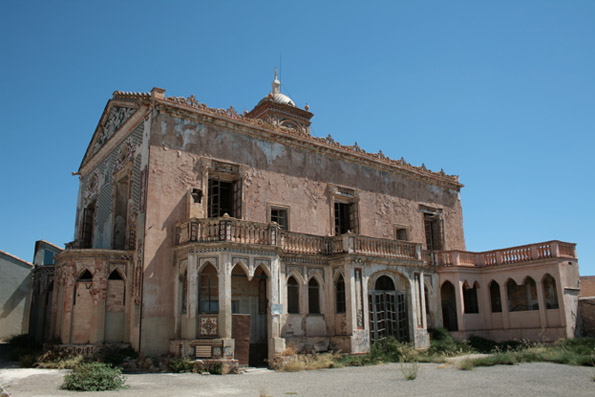 Fachada sur del Palauet, con los cuerpos añadidos por Miguel Nolla